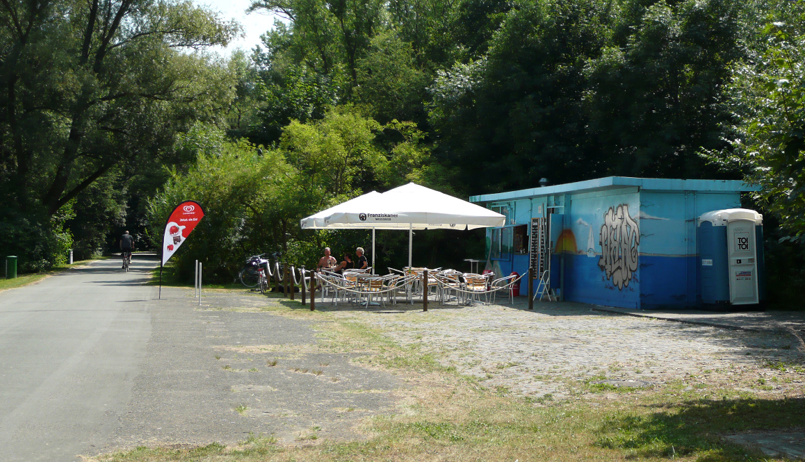 Kiosk Ricklinger Kiesteiche (Hannover)